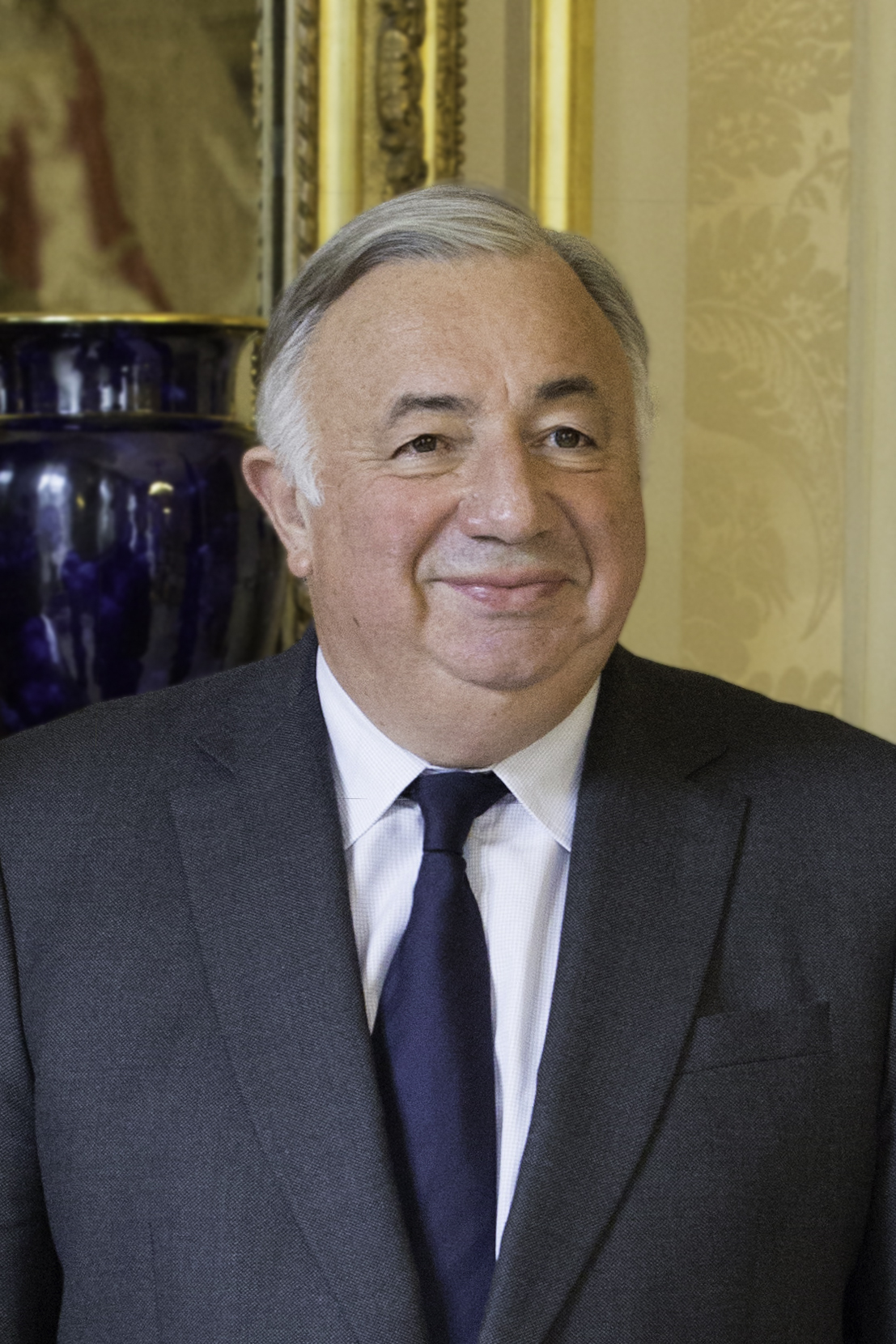 Gérard Larcher, Président du Sénat.